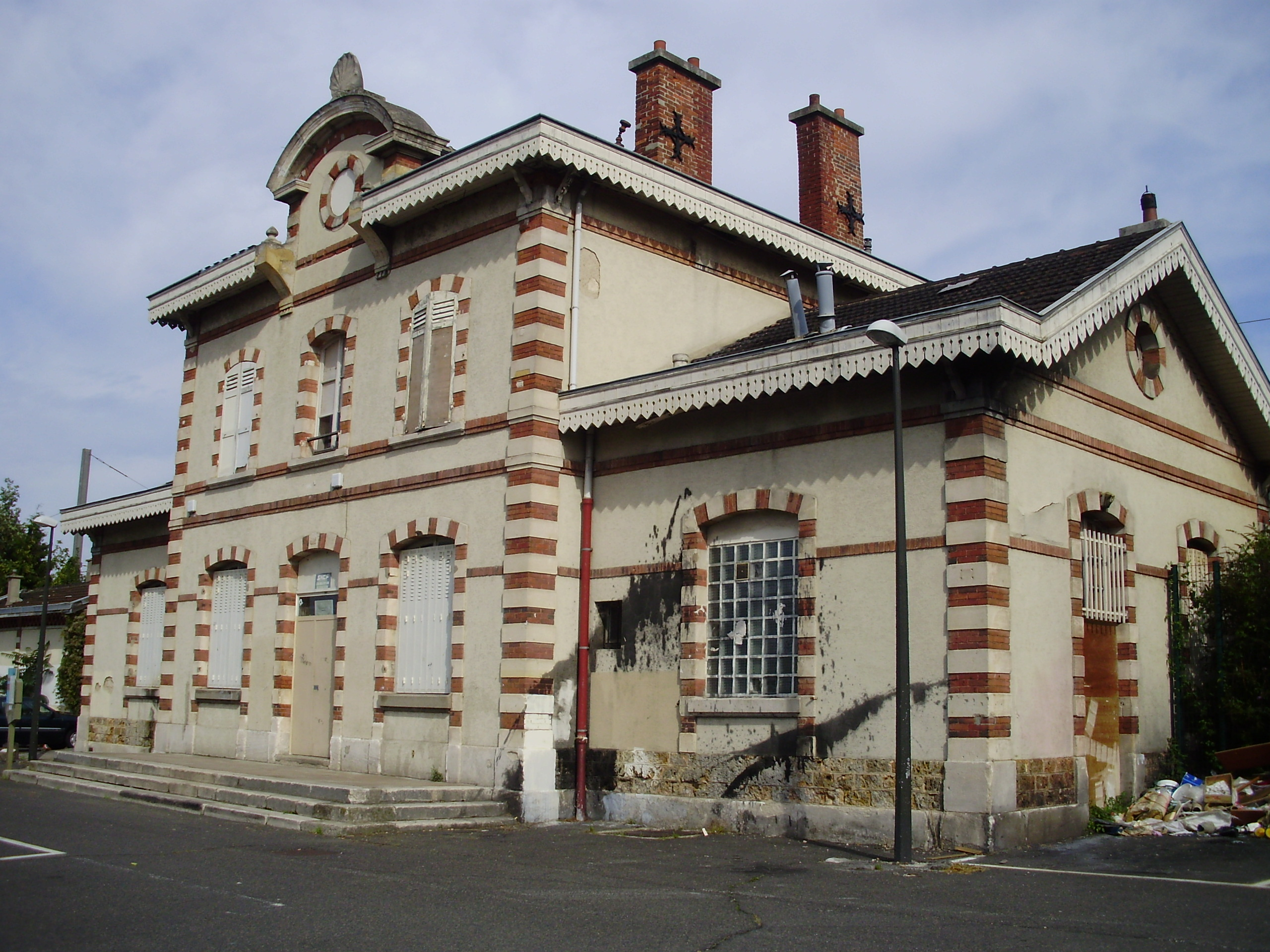 Gare d'Argenteuil - Grande-Ceinture, à Argenteuil, Val-d'Oise, France (vue du bâtiment depuis la place Aristide-Briand)